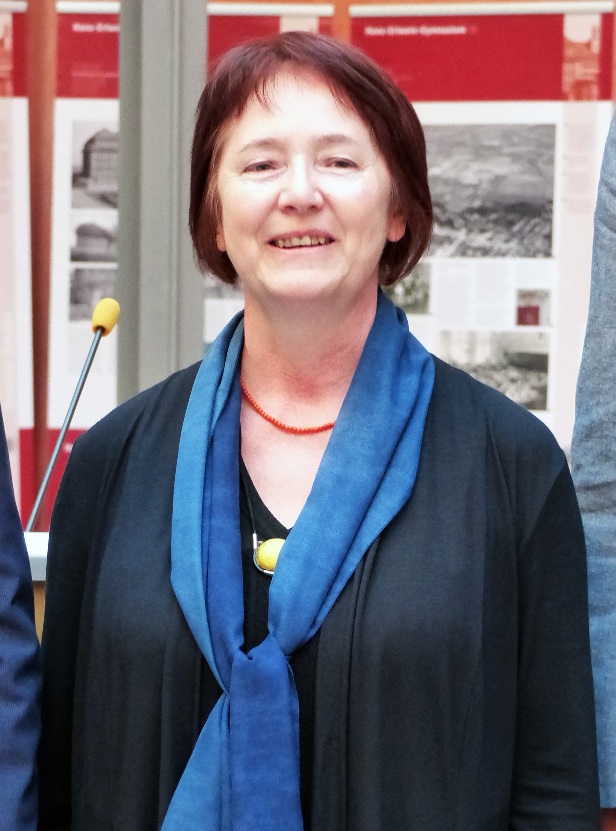 Prof. Rosemarie Pohlack, Sächsische Landeskonservatorin und Leiterin des Landesamtes für Denkmalpflege Sachsen, anlässlich der Eröffnung der Ausstellung "PEGASUS - Schulen adoptieren Denkmale" am 7. Mai 2015 in Dresden